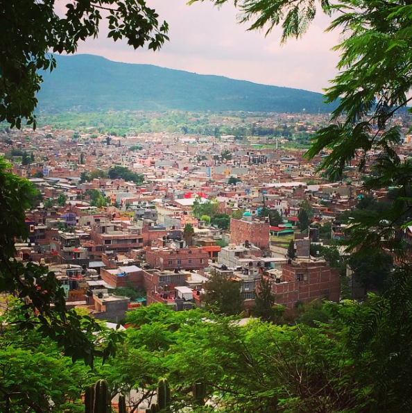 Vista Panorámica de Uriangato desde el Mirador